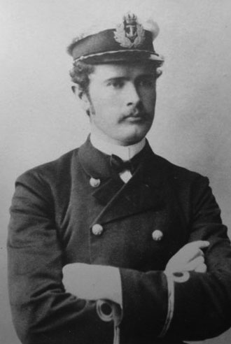 William Coucheron-Aamot i marineuniform.